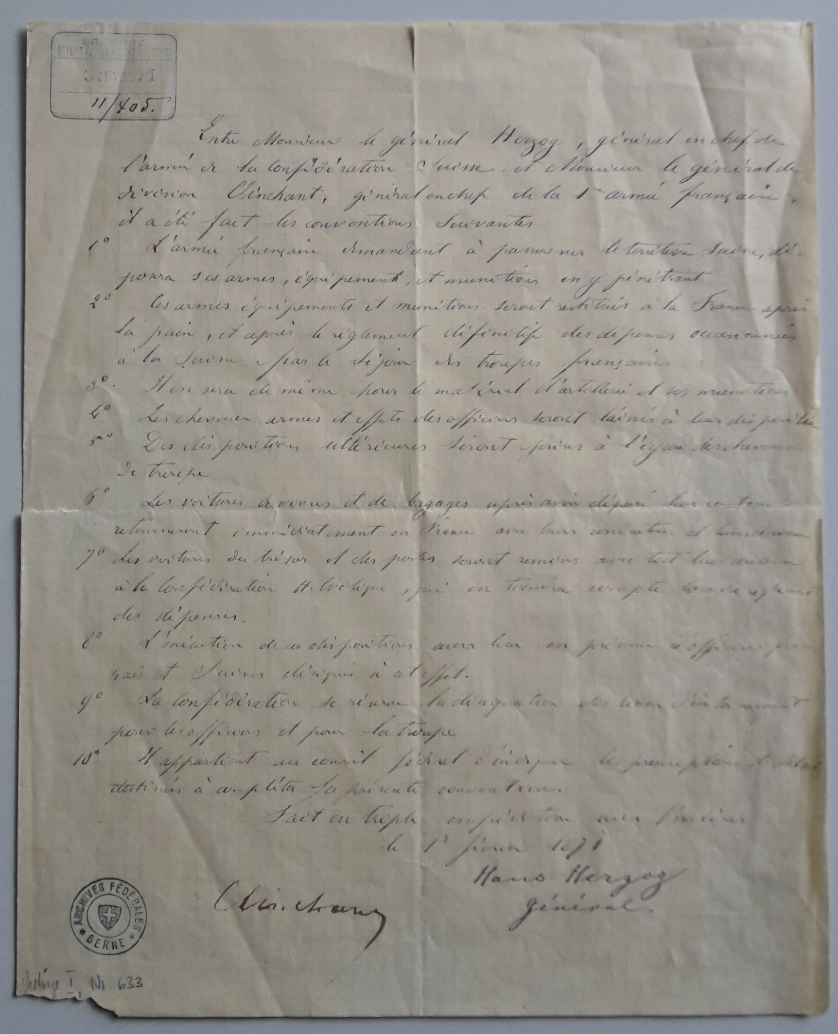 Vertrag zwischen der Schweiz und Frankreich zum Grenzübertritt der Bourbaki-Armee, unterzeichnet von den Generälen Herzog (CH) und Clinchant (F). Convention des Verrières